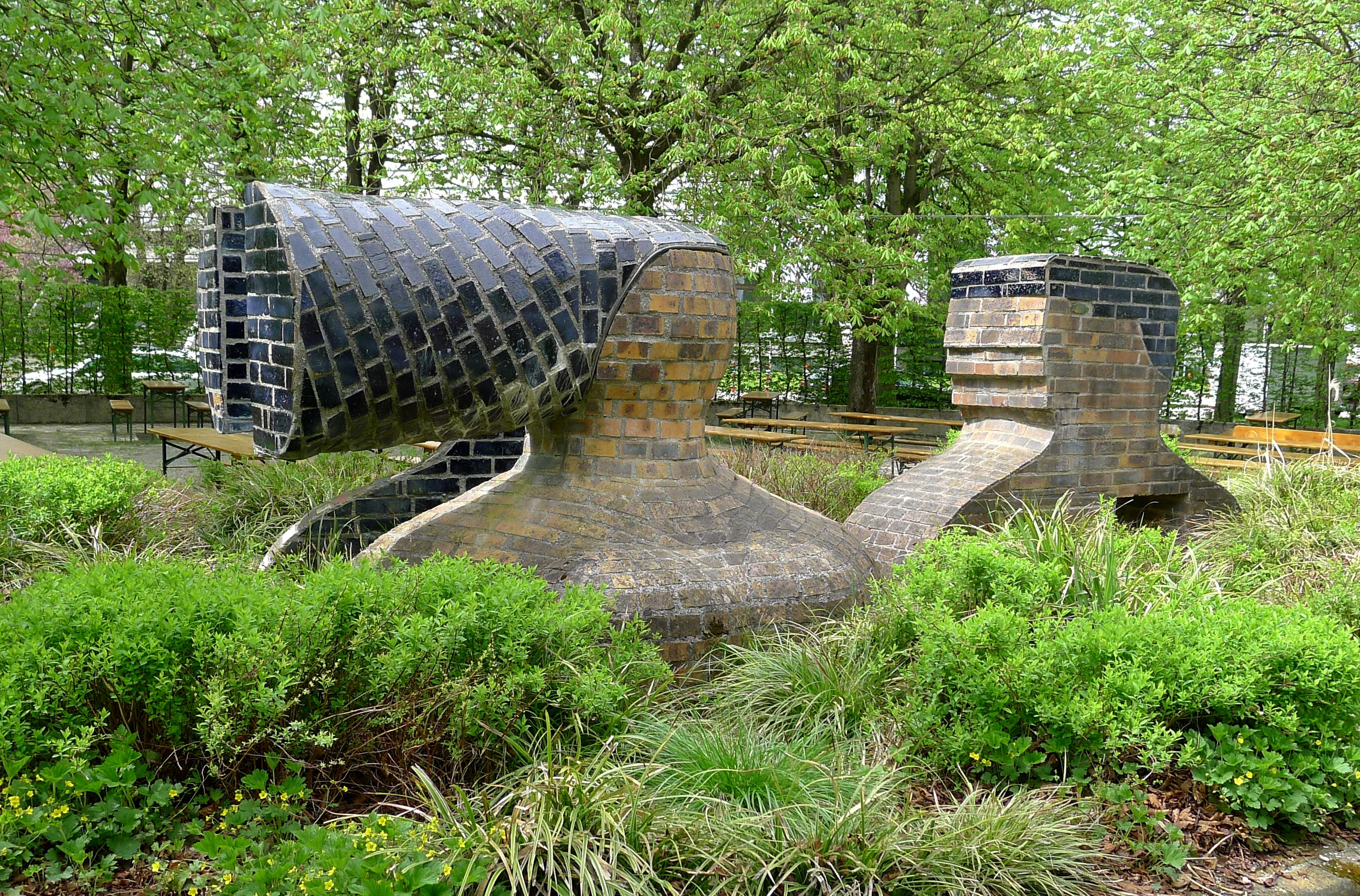 Plastik "Begegnung" von Klaus Schultze, 1983. Errichtet für die Internationale Gartenbauausstellung 1983. Die Plastik steht am Biergarten Hopfengarten.